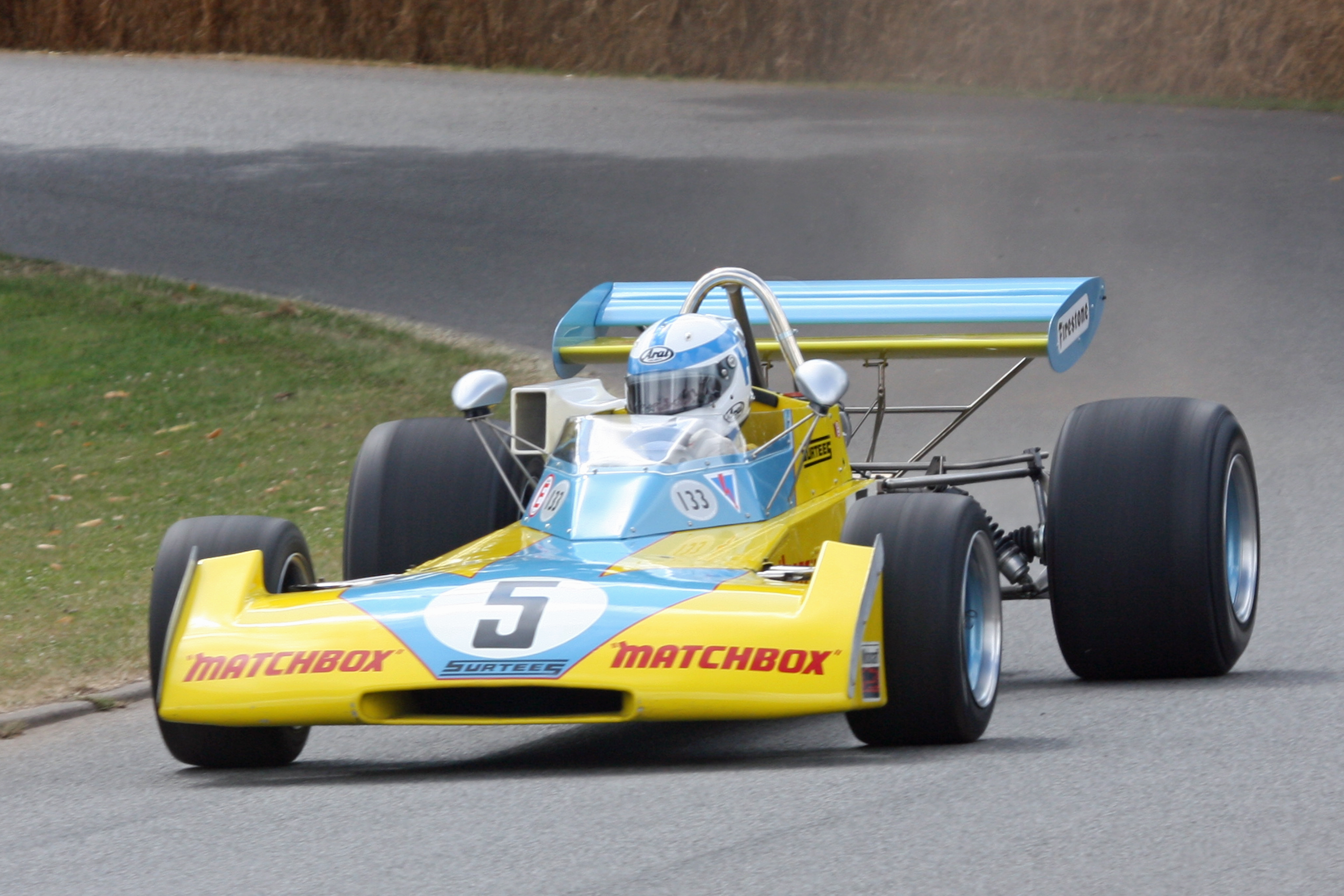 Goodwood 2009